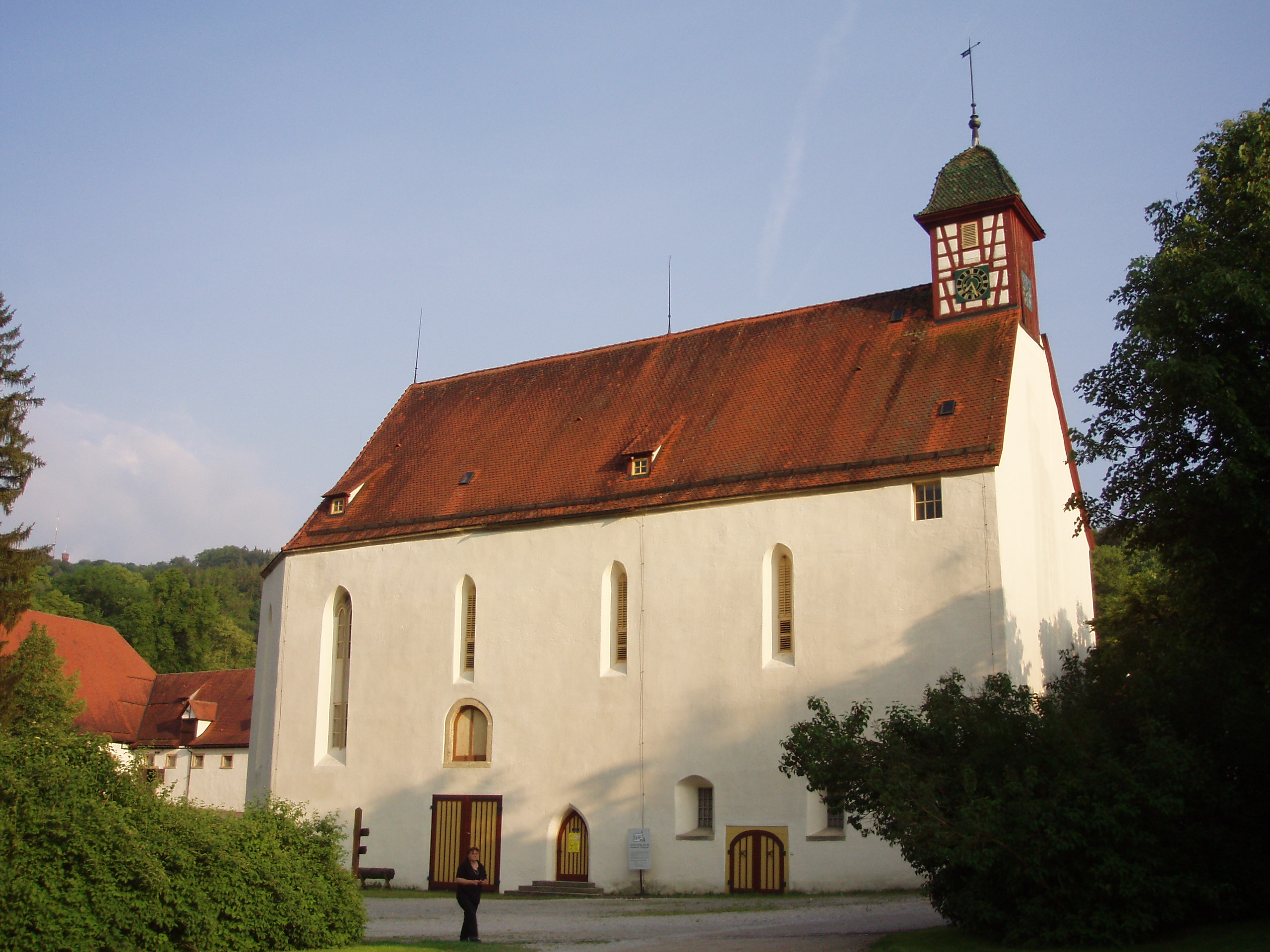 ehemalige Kirche, jetziges Gestütsmuseum in Offenhausen